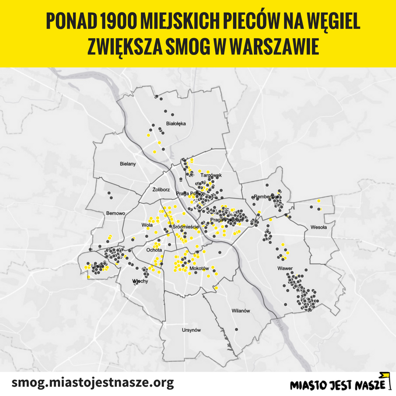 Mapa 1934 lokali należących do m.st. Warszawy niepodłączonych są do sieci ciepłowniczej i ogrzewane są węglem wg wyliczeń MJN na podstawie danych Urzędu m.st. Warszawy.